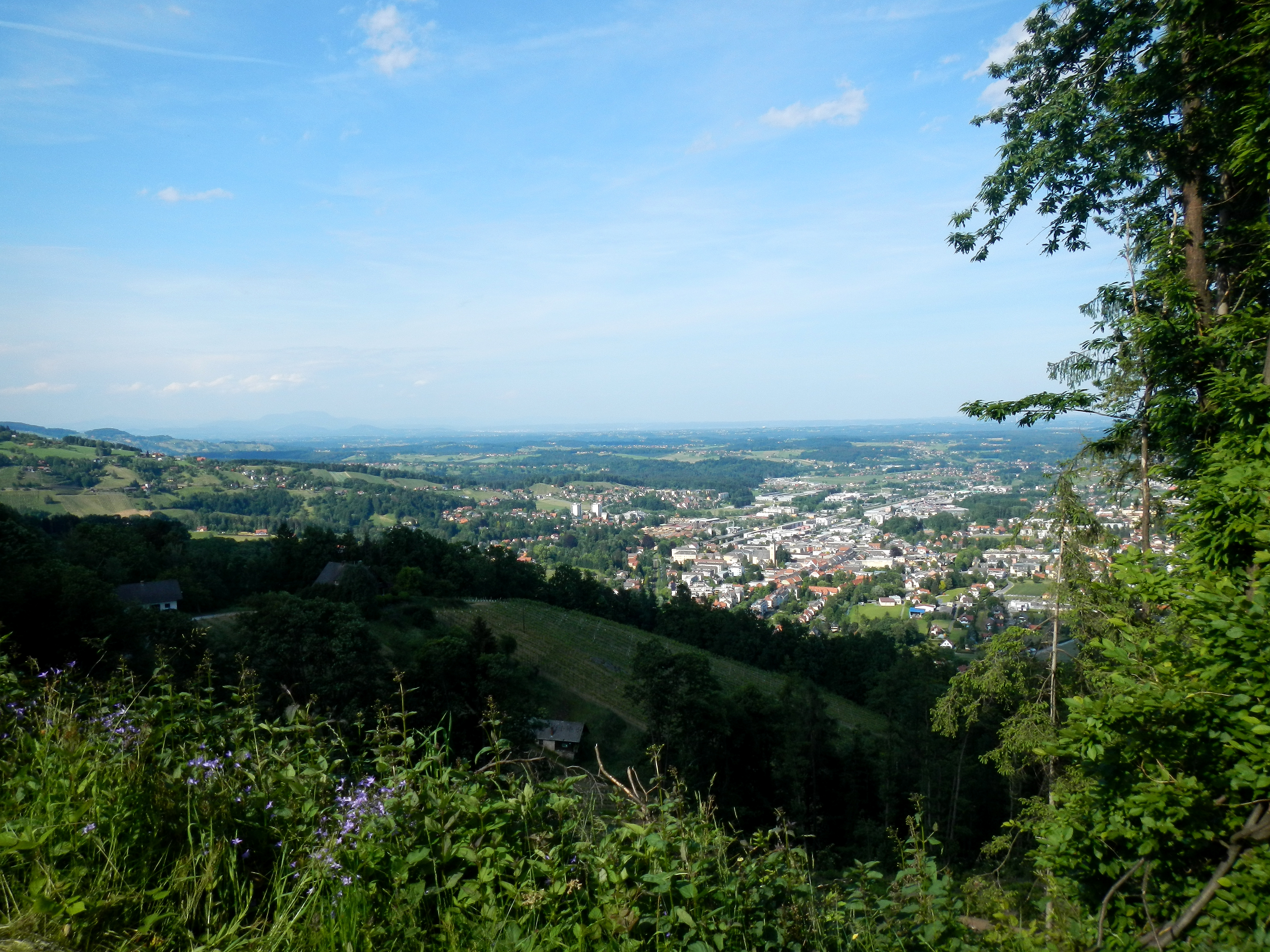 Der Kraxnerkogel ist Standort einer mittelalterlichen Siedlungs- oder Befestigungsanlage, die nur mehr als Bodenunebenheiten erkennbar ist. Von ihm aus bietet sich weiter Rundumblick in der Umgebung von Deutschlandsberg